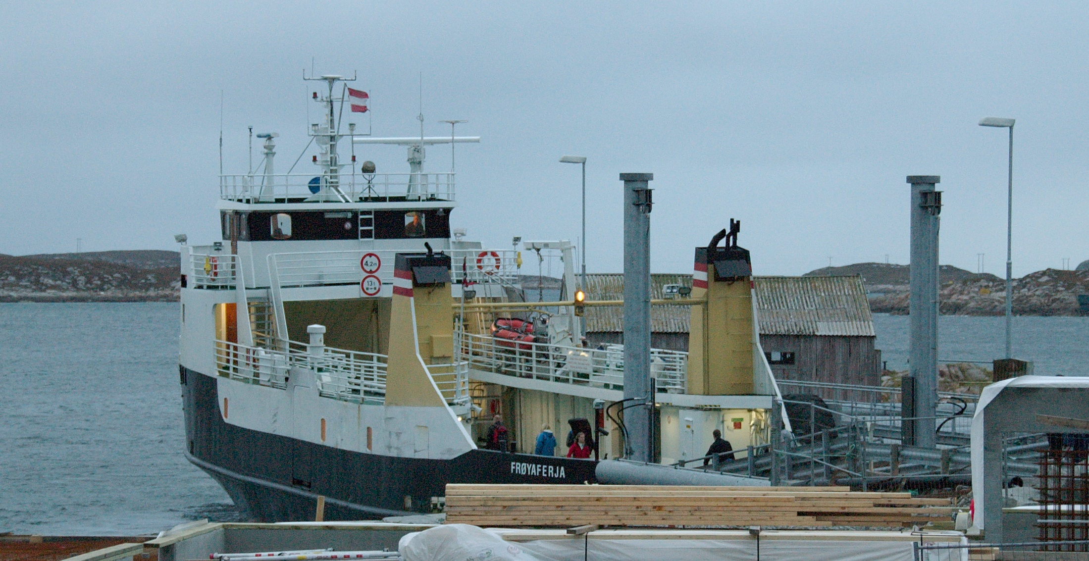 MF Frøyaferja